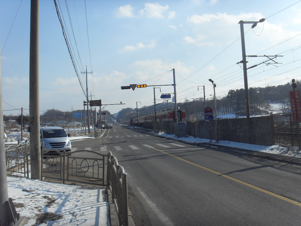 청연로와 내판로 분기점